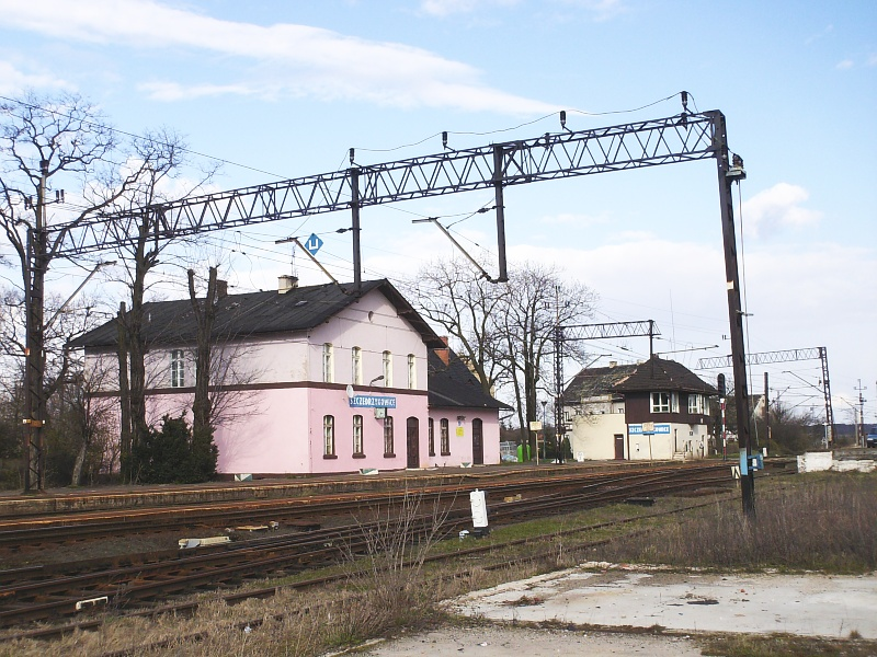 Stacja kolejowa w Szczedrzykowicach-stacji / Railway station in Szczedrzykowice-stacja willage